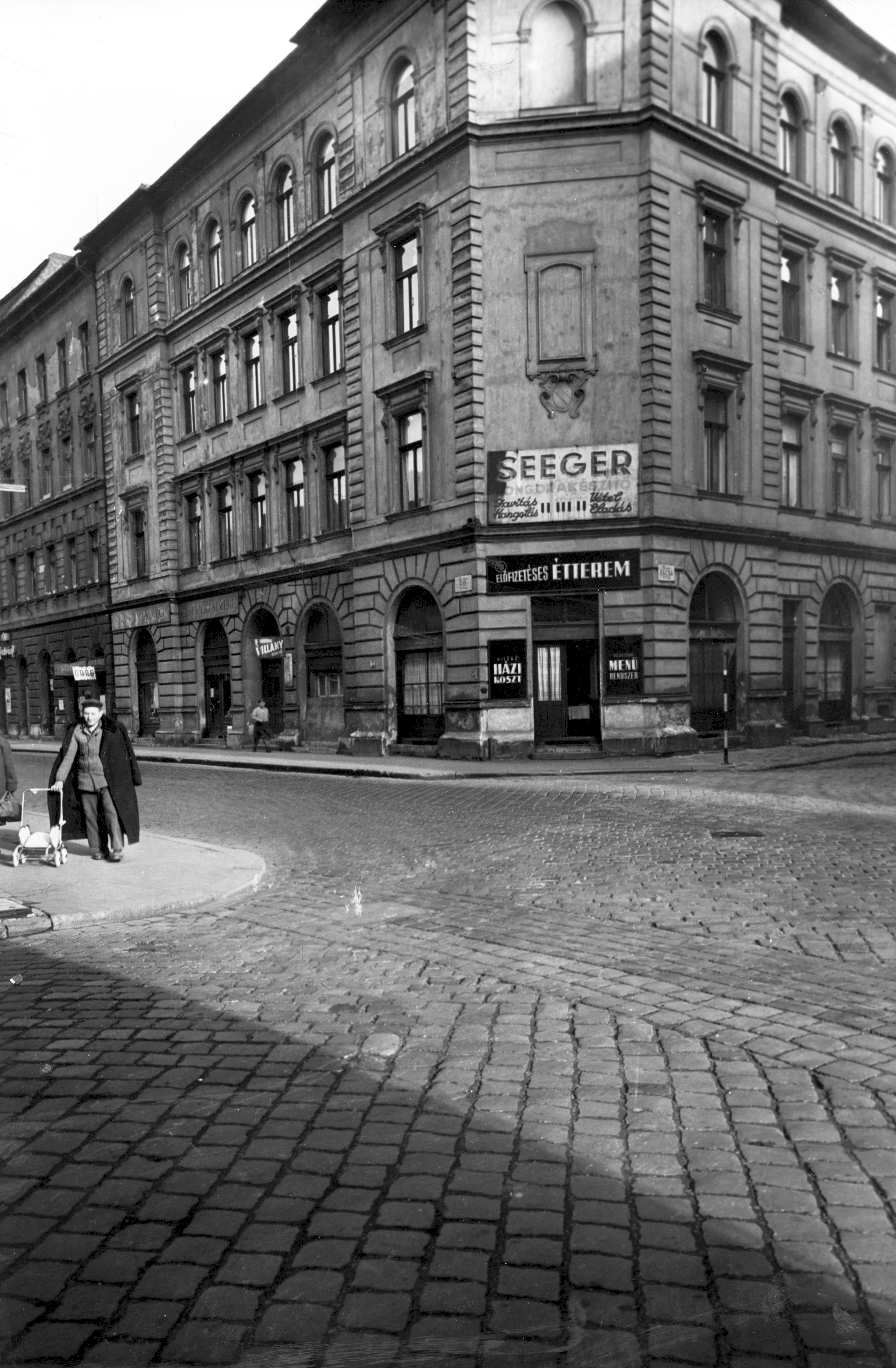 Fő utca 75., Kacsa utca sarok. A kép forrását kérjük így adja meg: Fortepan / Budapest Főváros Levéltára. Levéltári jelzet: HU_BFL_XV_19_c_11 Location: Hungary, Budapest II. Tags: Budapest Title: Fő utca 75., Kacsa utca sarok. A kép forrását kérjük így adja meg: Fortepan / Budapest Főváros Levéltára. Levéltári jelzet: HU_BFL_XV_19_c_11